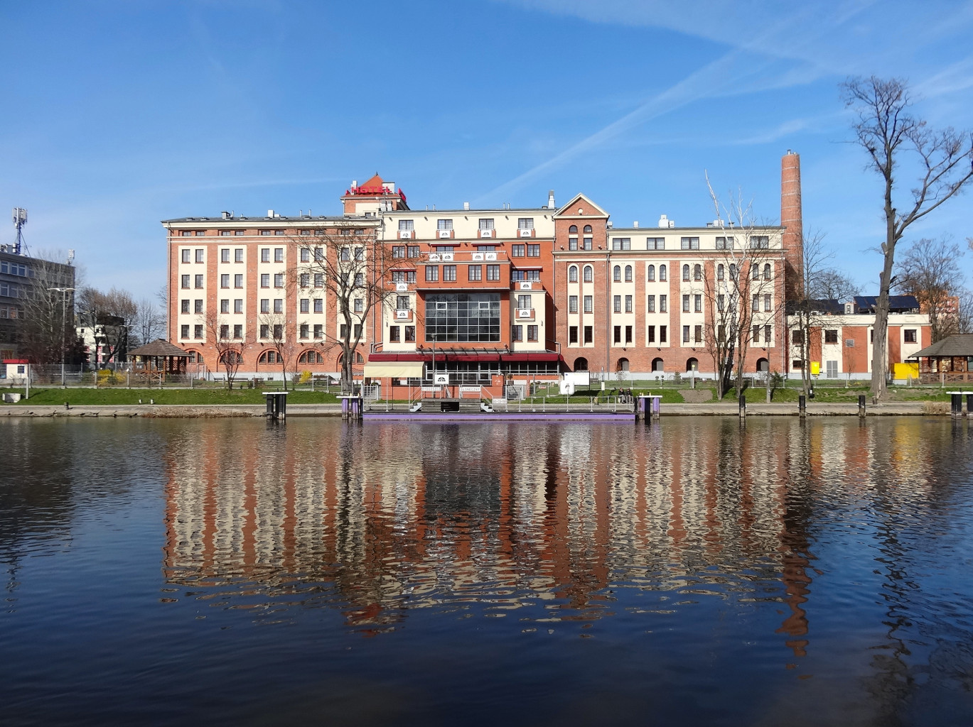 Hotel "Słoneczny Młyn" urządzony w 2006 r. w XIX-wiecznym młynie Kenzera w Bydgoszczy przy ul. Jagiellońskiej